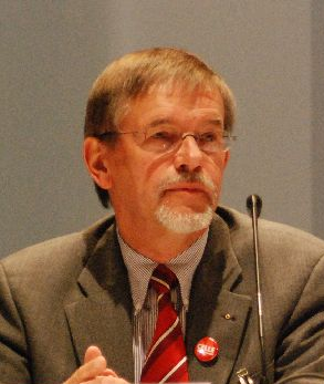 Dieter Möhrmann bei der Landesvertreterversammlung der niedersächsischen SPD zur Bundestagswahl 2009.